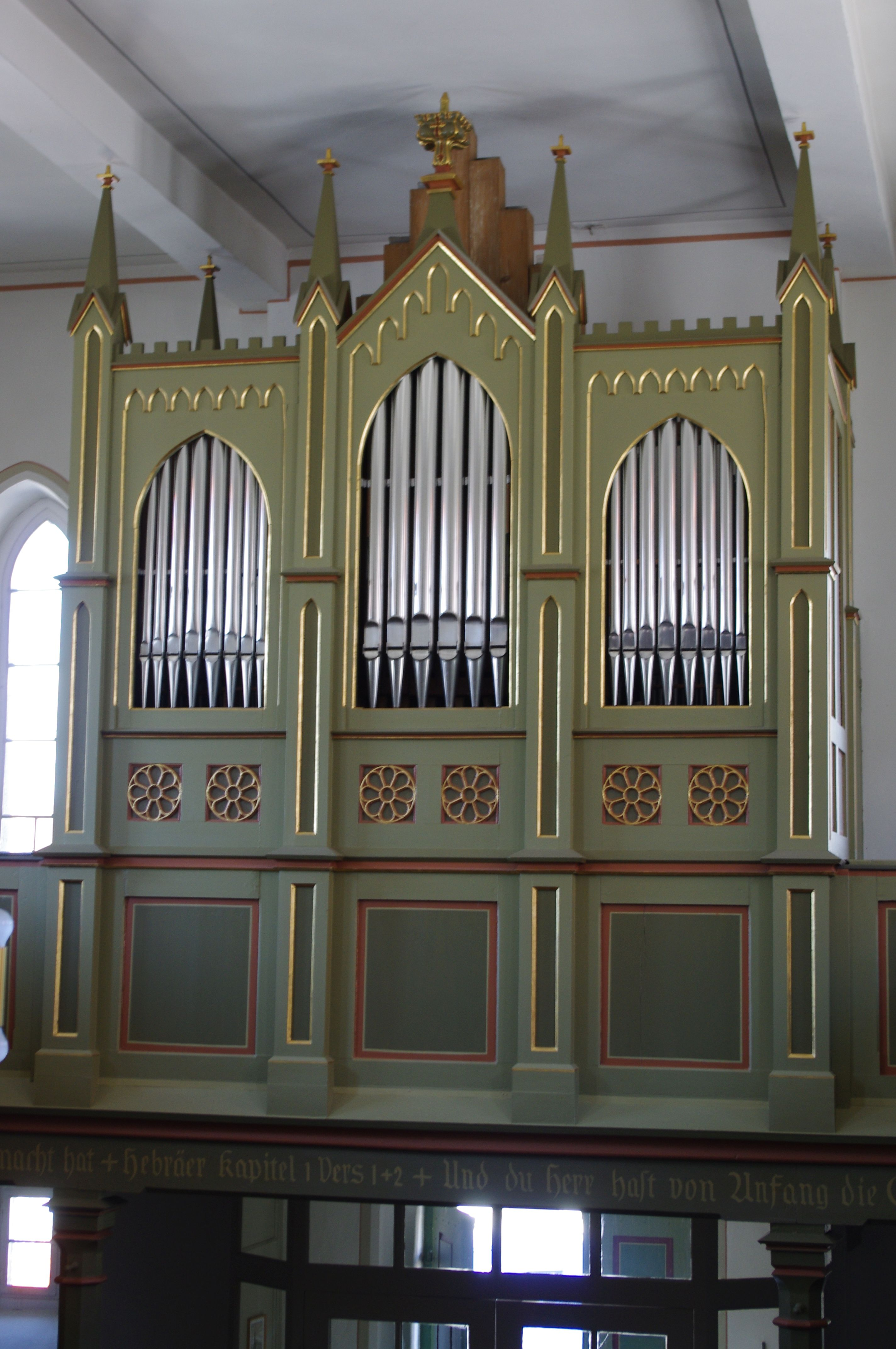 Orgel der ev. Kirche Weitershain